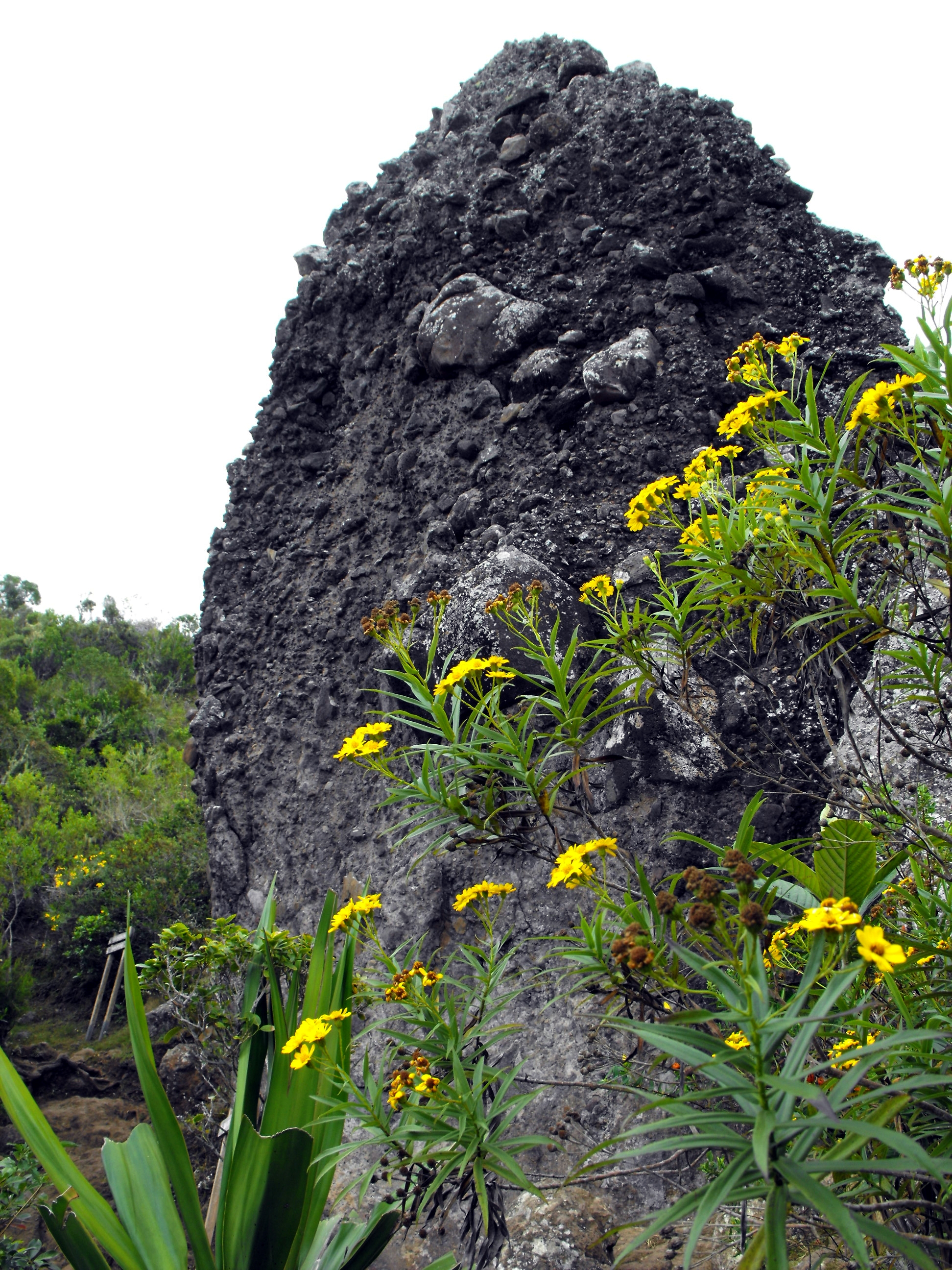 La Réunion: Dos d'Ane: Roche de Verre Bouteille - Lavabomben